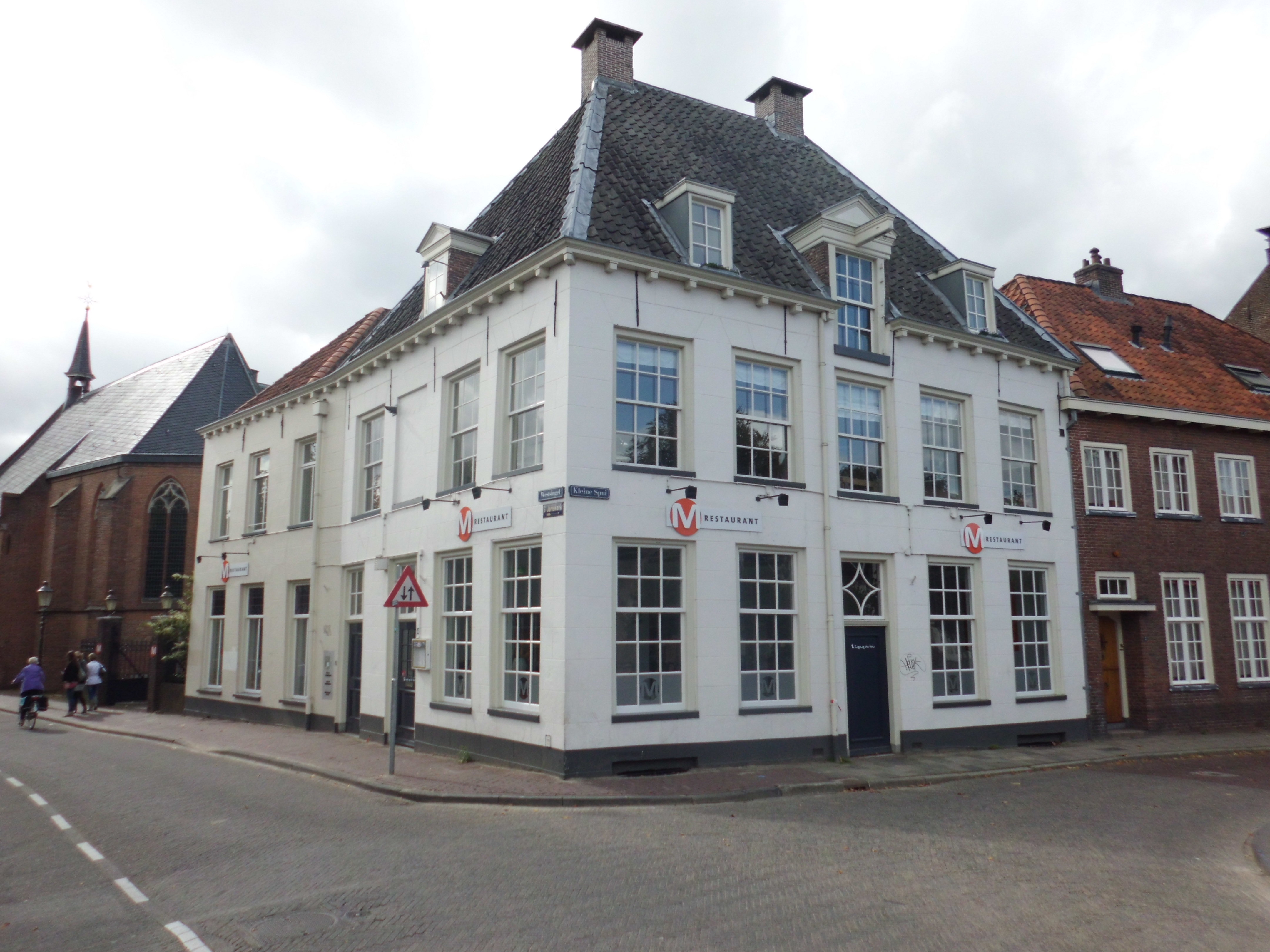 Westsingel 49 ab Amersfoort